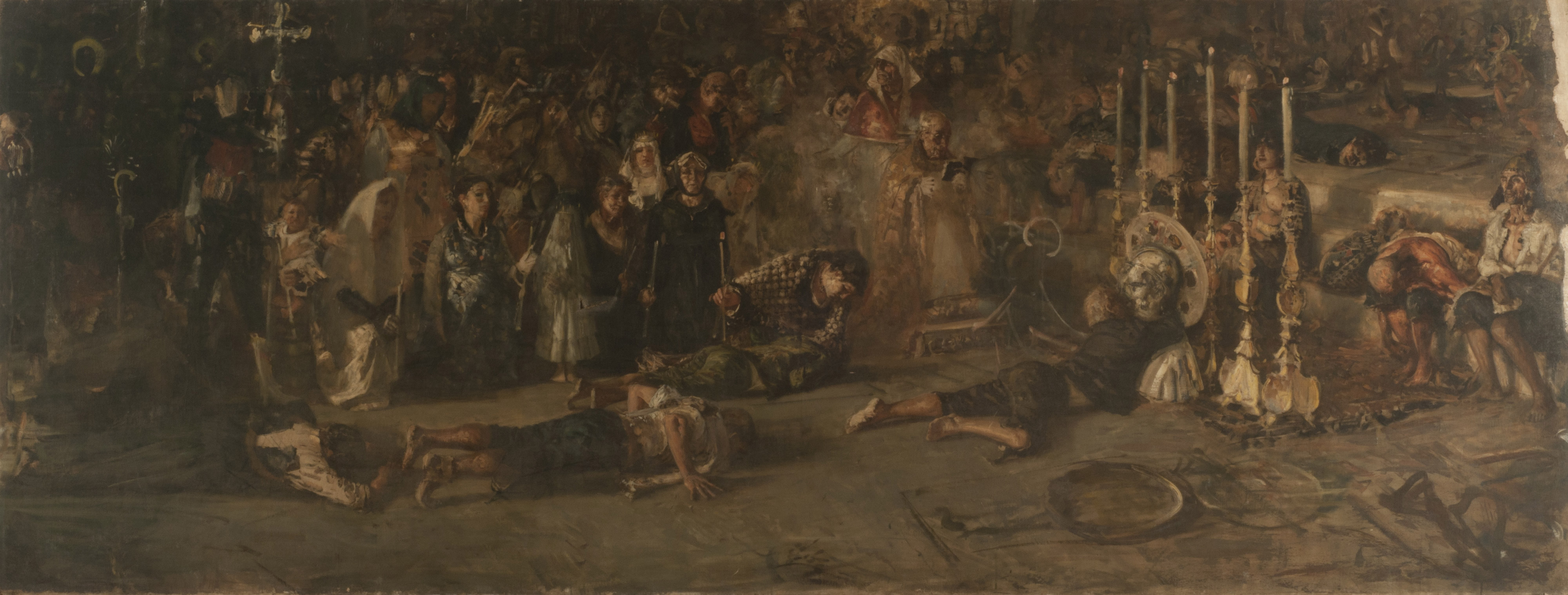 Francesco Paolo Michetti, El voto (boceto). 1882. 107,5 x 281 cm, óleo sobre tela. Inv. 5720.